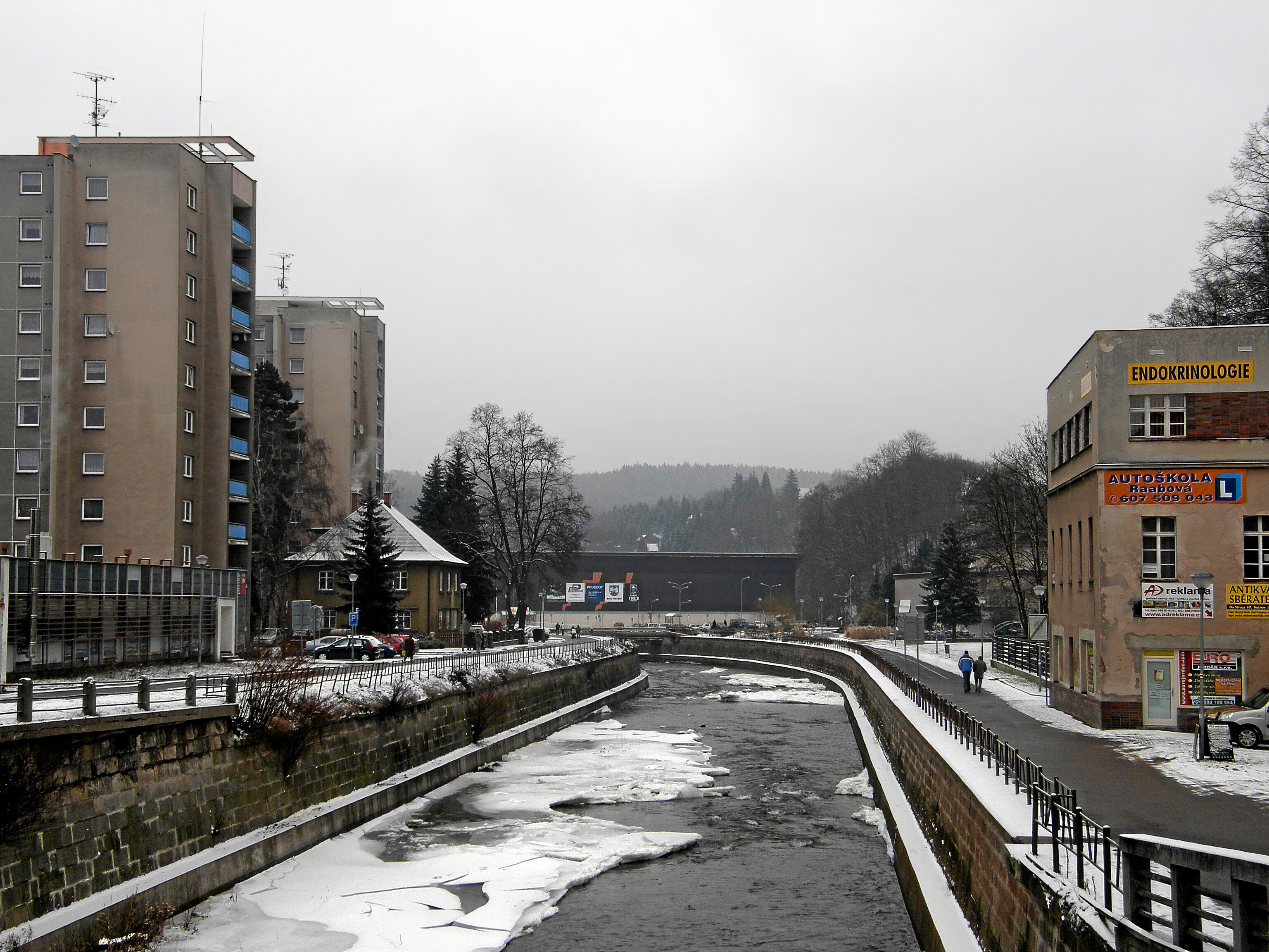 Pohled ze Špitálského mostu na řeku Úpu v Trutnově - Dolní Předměstí. Vpravo: nábřežní ulice Na Lukách s bývalou poliklinikou. V pozadí, uprostřed: Lázeňský most u plaveckého stadionu a zimní stadion. Vlevo: ulice Úpské nábřeží.